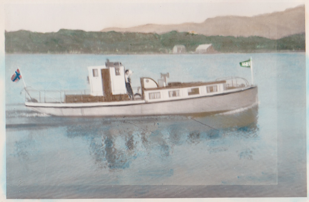 MB Sjøgutt på vei inn til Florø